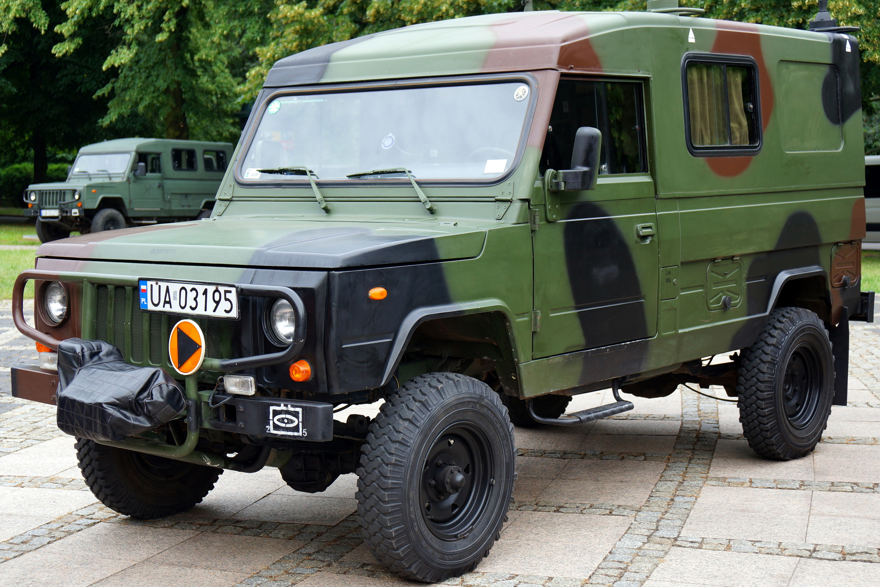 Tarpan Honker 5 Lubuskiego Pułku Artylerii w Sulechowie